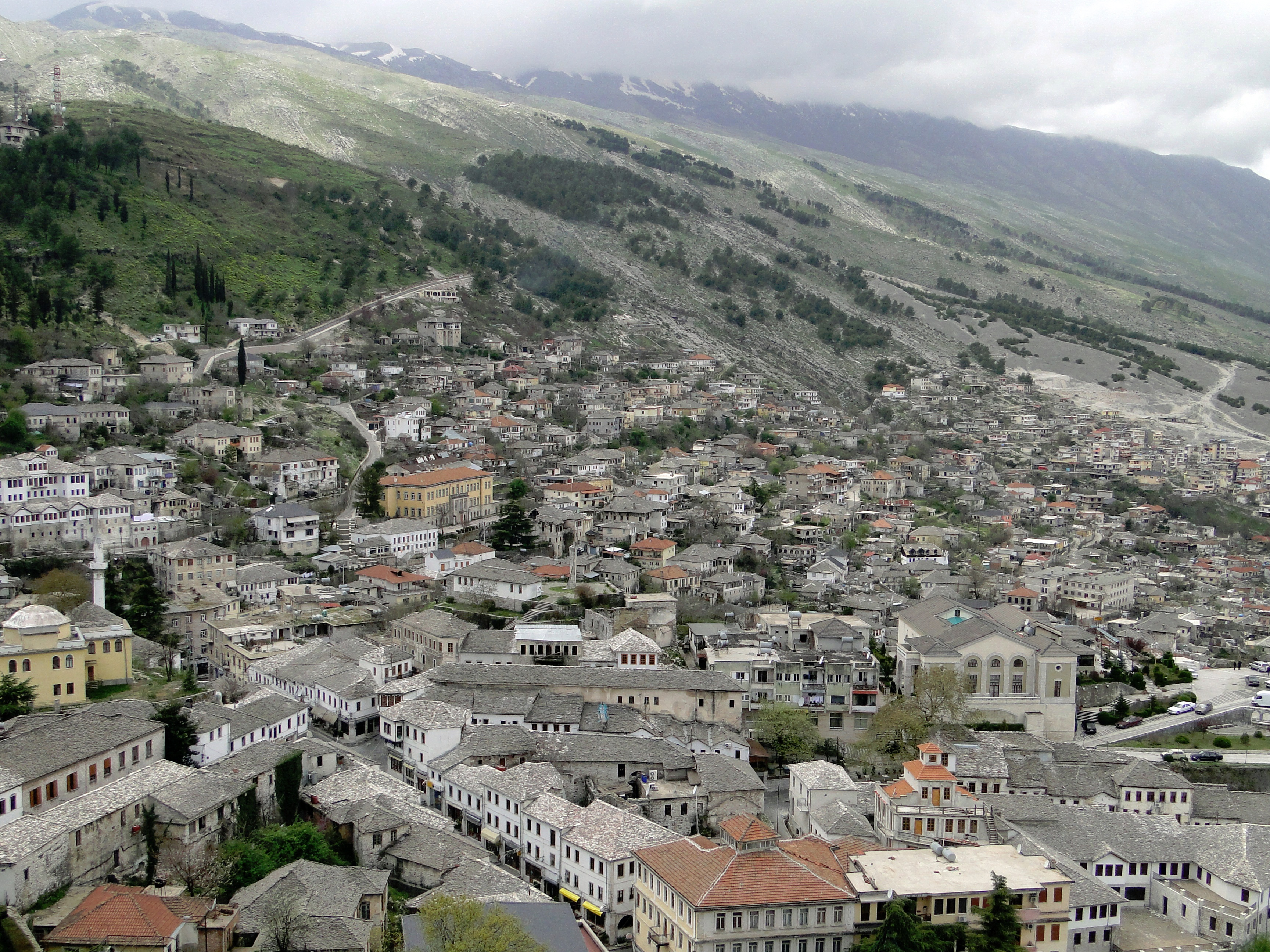 Gjirokastra